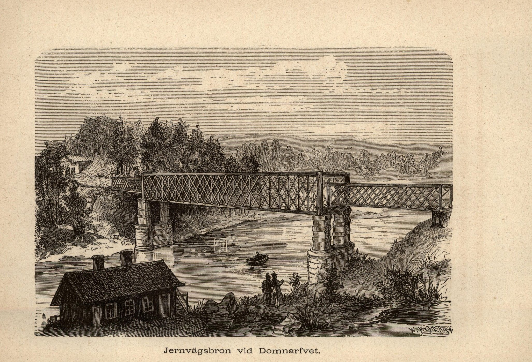 Jernvägsbron vid Domnarfvet